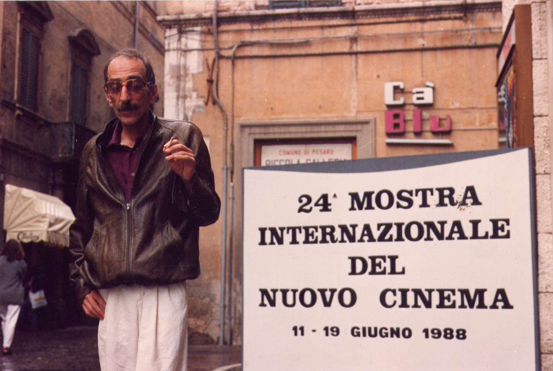 João César Monteiro alla Mostra del Nuovo Cinema di Pesaro (1988)